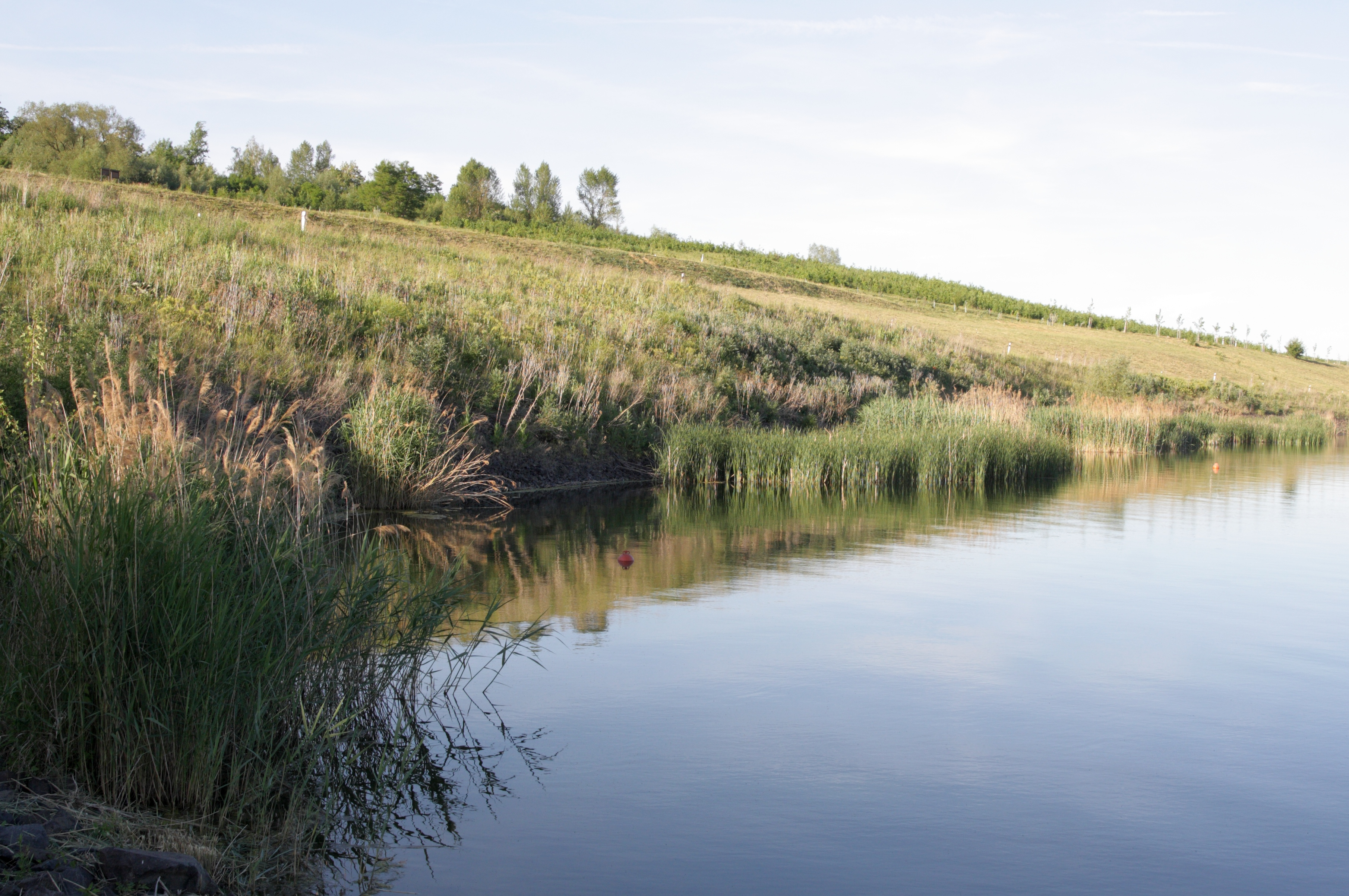 Jezero Milada - litorální porost u SZ břehu